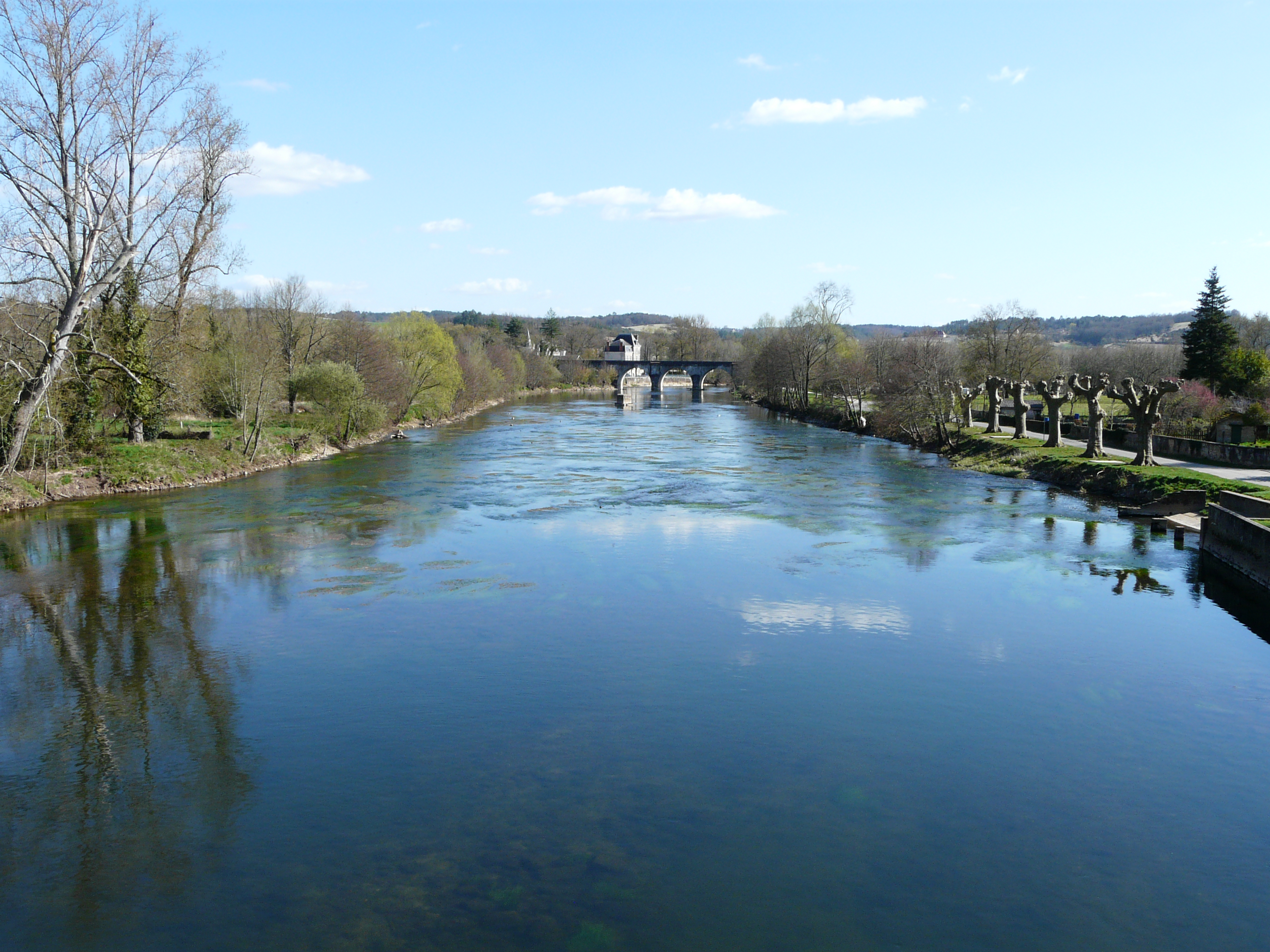 L'Isle en aval du pont de Saint-Astier, Dordogne, France